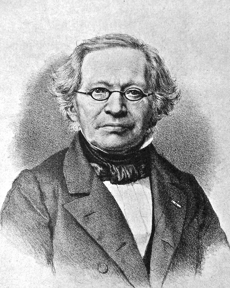 Henrik Hertz (1797/1798–1870) var en dansk digter og dramatiker.